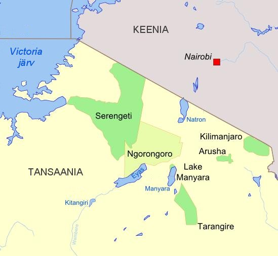 Serengeti kaart